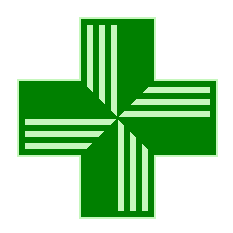 Farmacias Cruz Verde